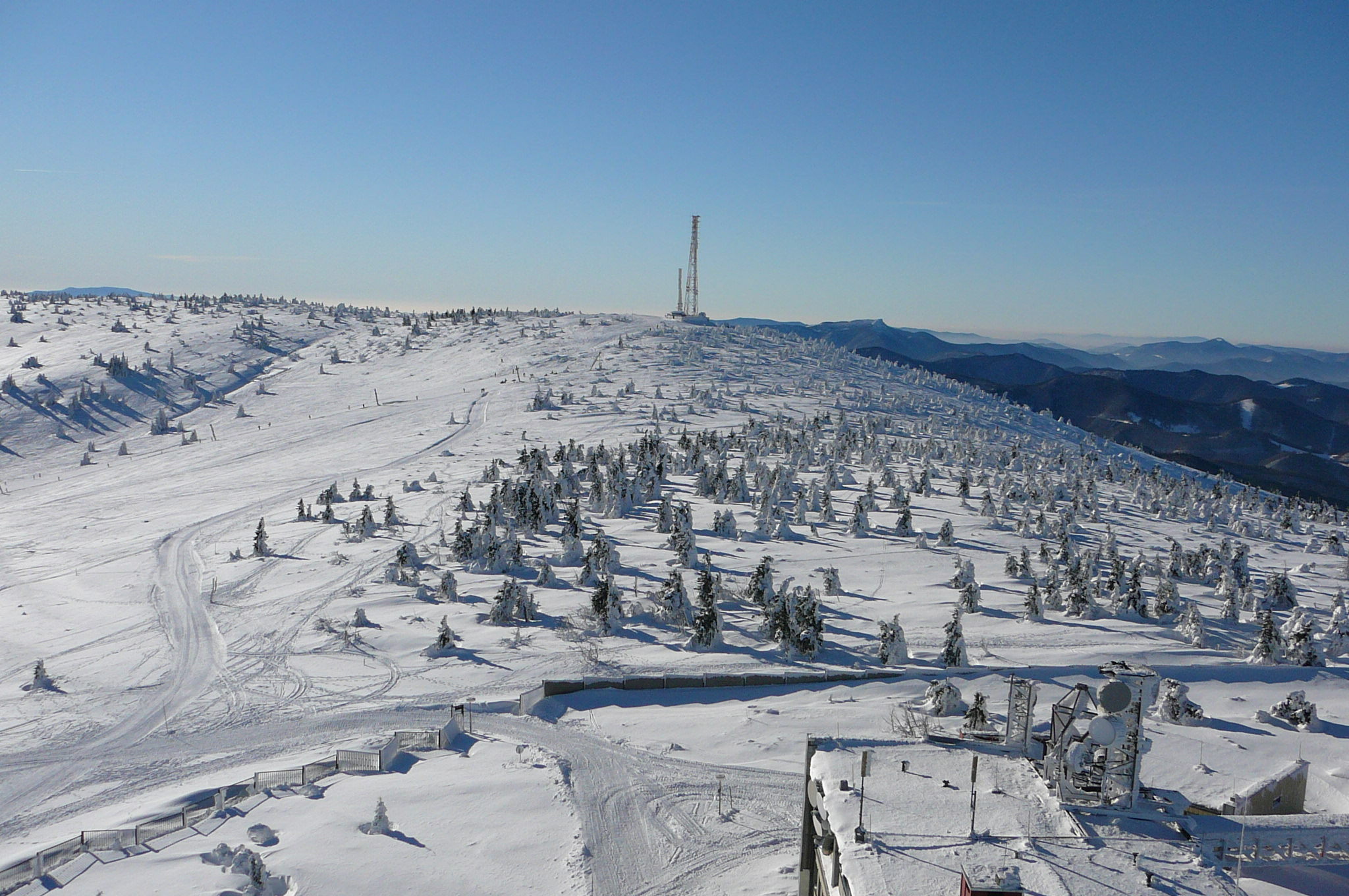 Vrchol Veľkej Lúky